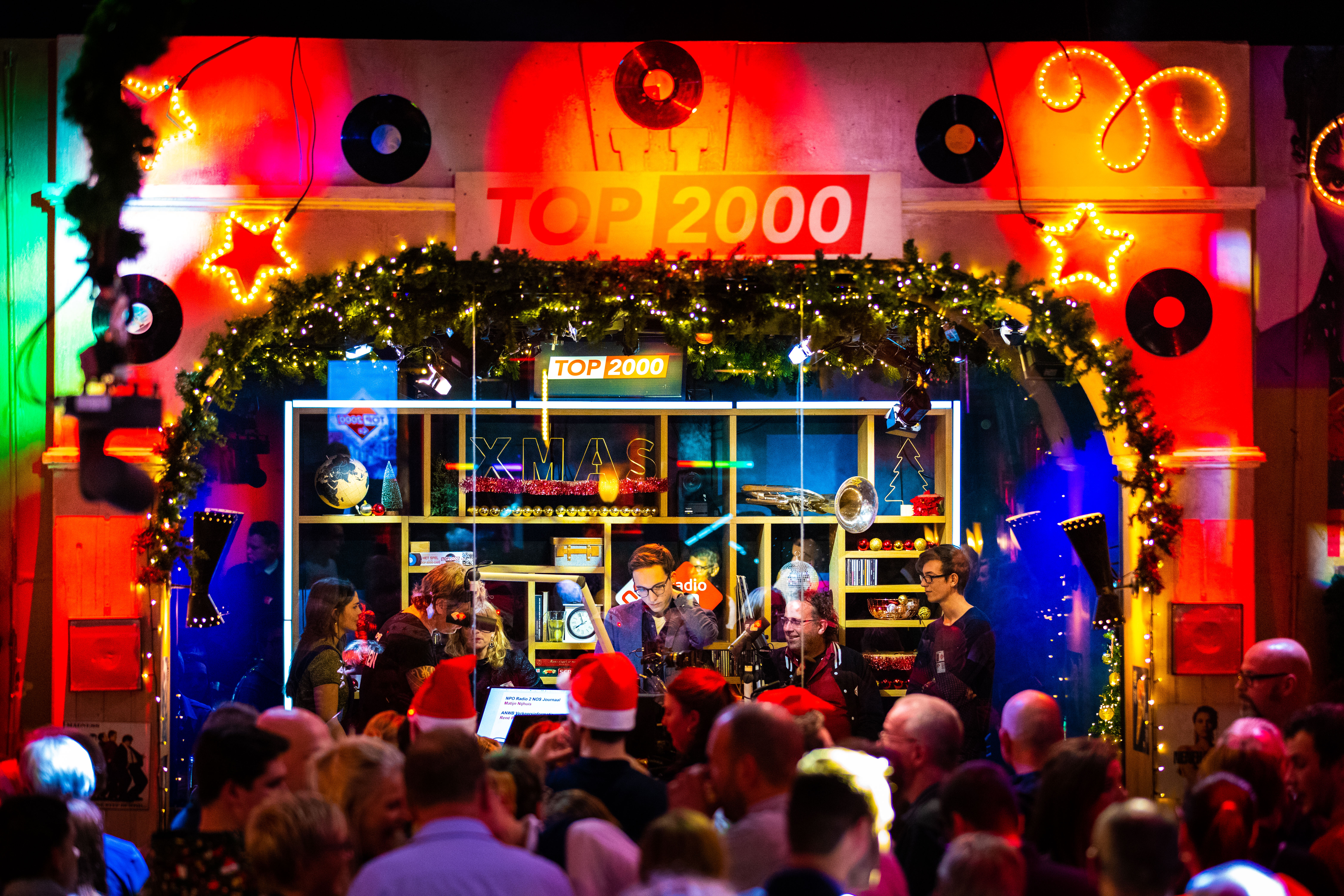 Top 2000 café van NPO Radio 2 bij Beeld en Geluid tijdens de editie van 2018